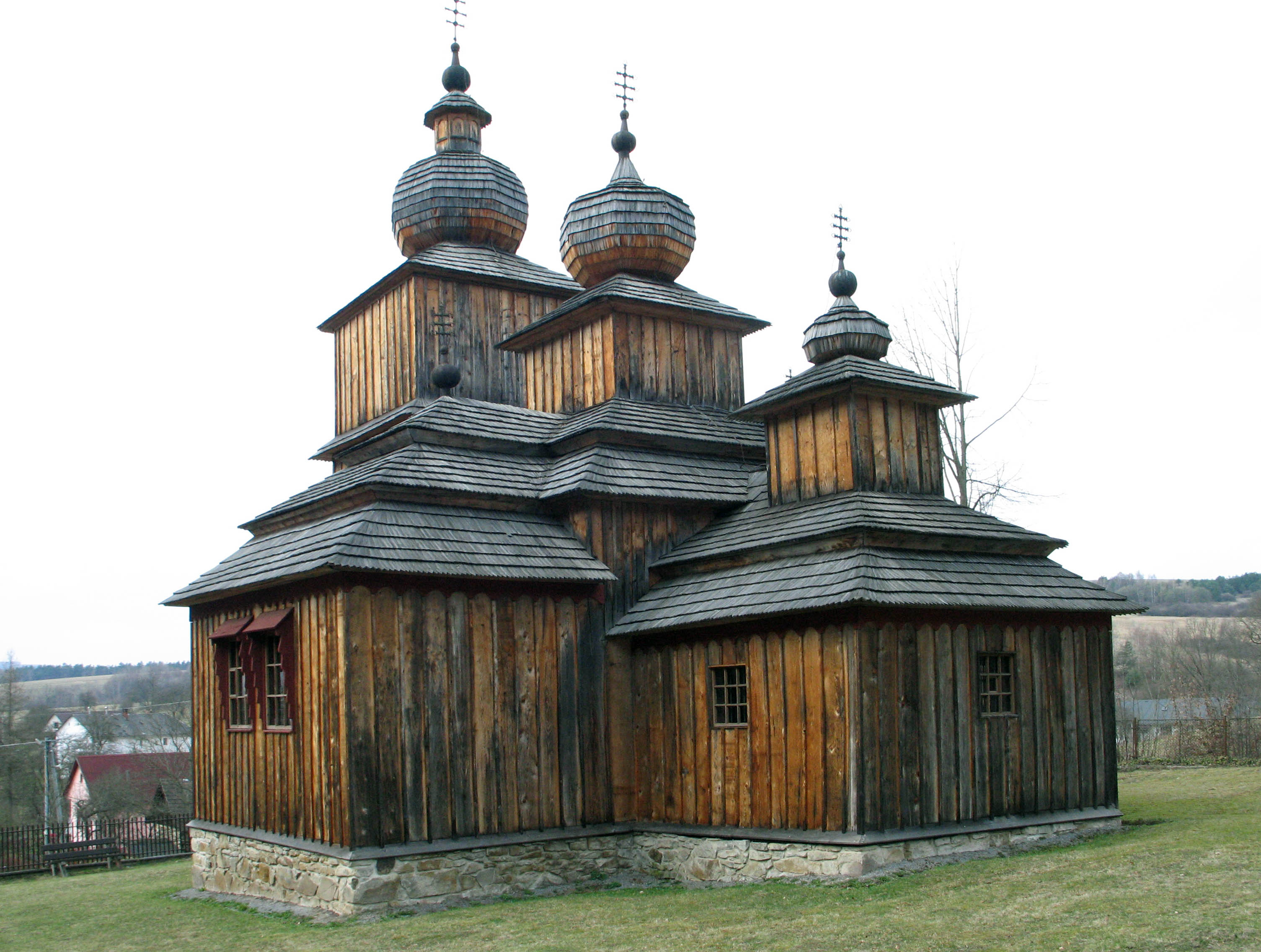 Bočný pohľad na cerkvu v Dobroslave